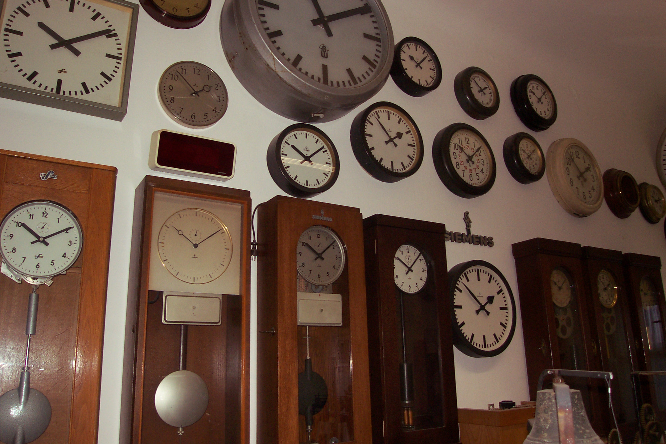 Uhrenmuseum Lichtenwalde im Schloss Lichtenwalde